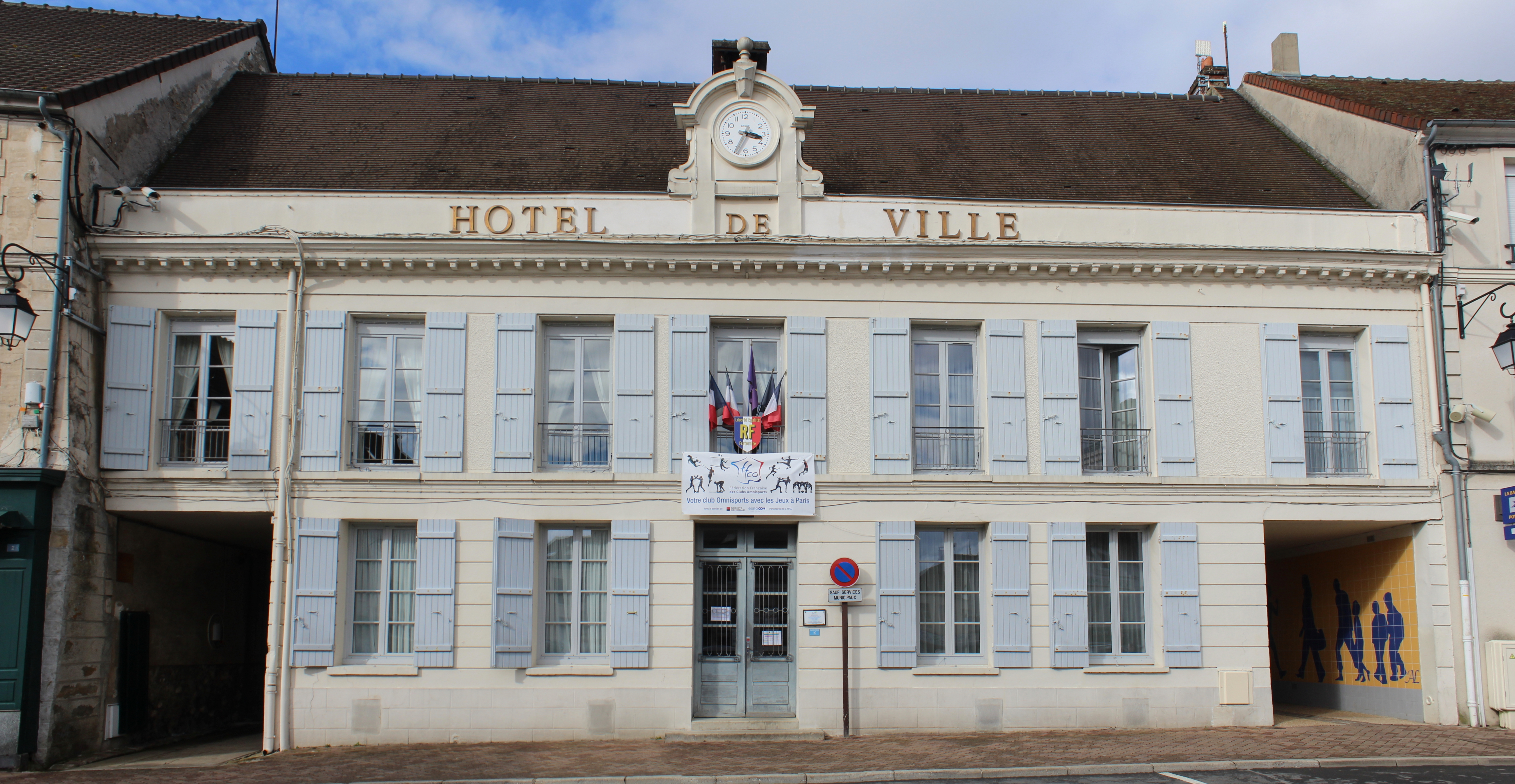 Hôtel de ville de La Ferté-Gaucher.